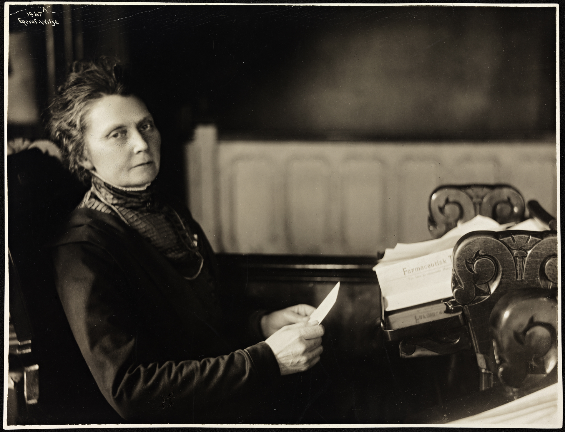 Tittel / Title: Portrett av Anna Rogstad (1854-1938) på Stortinget Motiv / Motif: Anna Rogstad var lærer, kvinnesakskvinne og politiker (Frisinnede Venstre). Hun ble landets første kvinnelige stortingsrepresentant (FV) valgt på fellesliste av Høyre og Frisinnede Venstre som vararepresentant for Høiremannen Jens Bratlie. Dato / Date: 19. mars 1911 Fotograf / Photographer: Anders Beer Wilse (1865-1949) Sted / Place: Oslo, Stortinget Eier / Owner Institution: Nasjonalbiblioteket / National Library of Norway Lenke / Link: Bildesignatur / Image Number: blds_05073